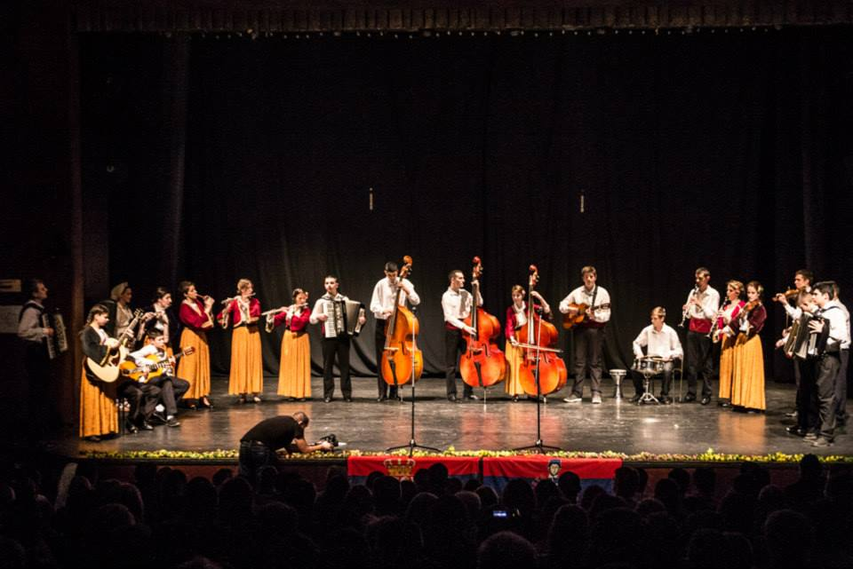 Godišnji koncert